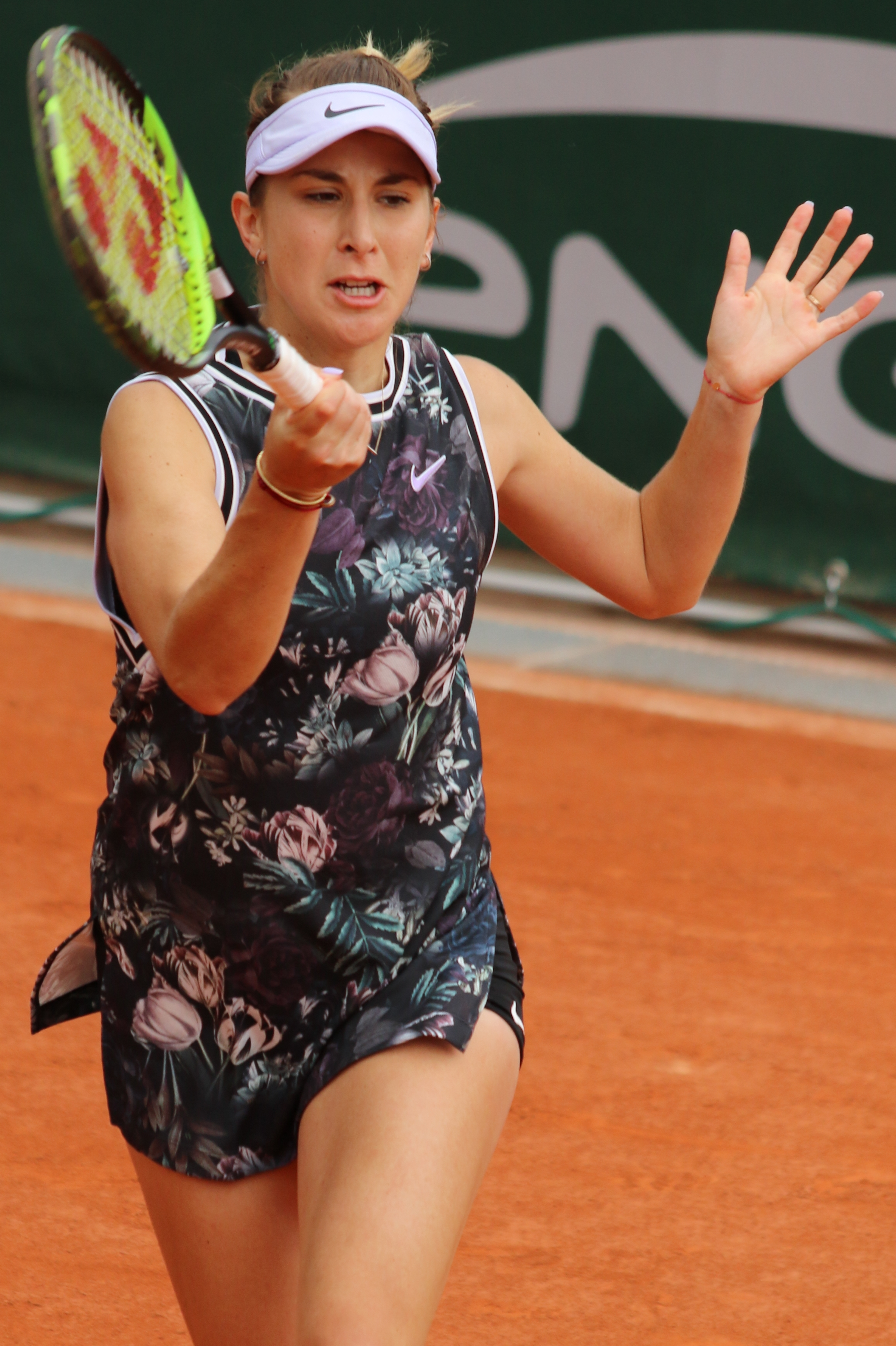 Bencic RG19 (42)